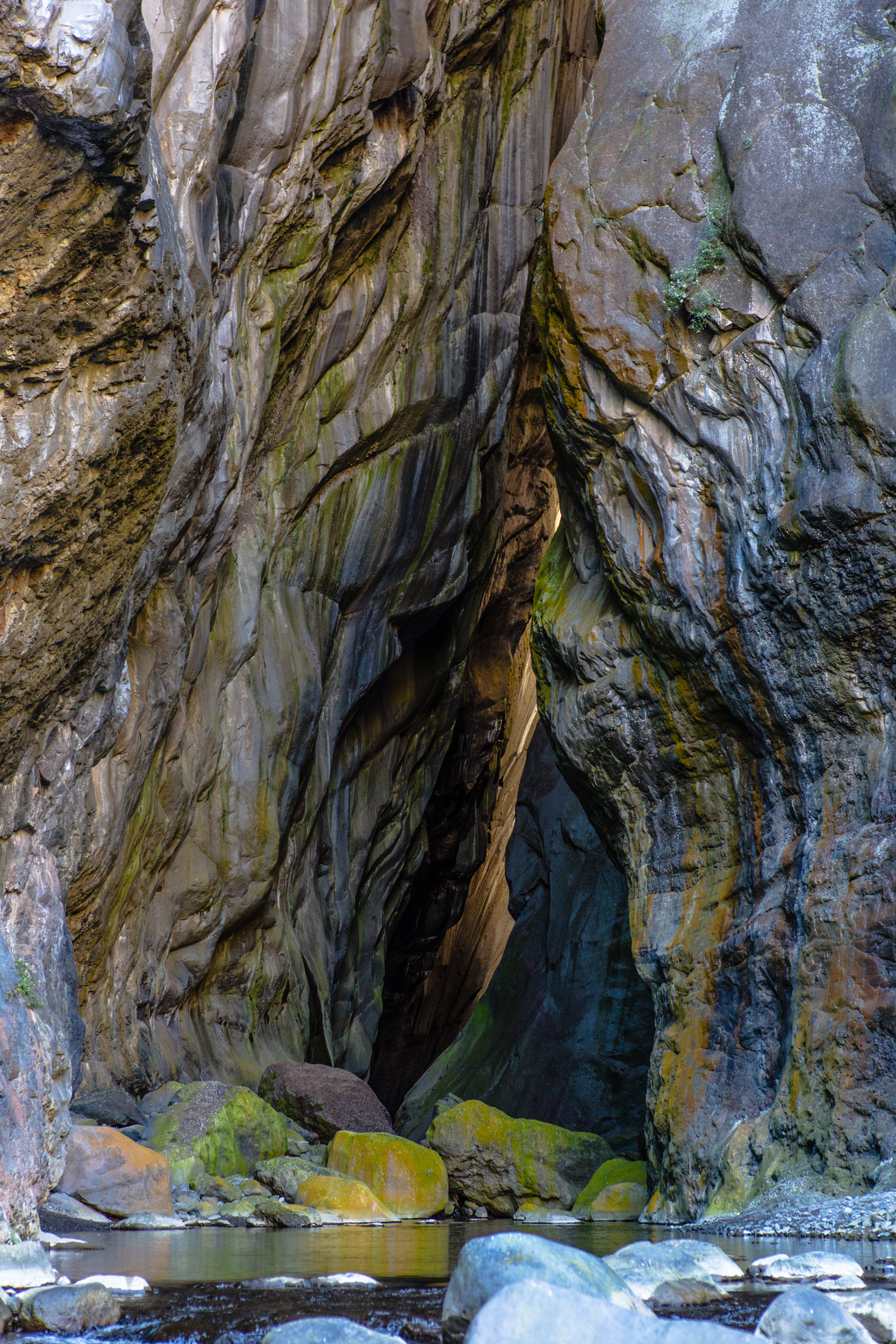 Une randonnée qui mène à la Chapelle à Cilaos